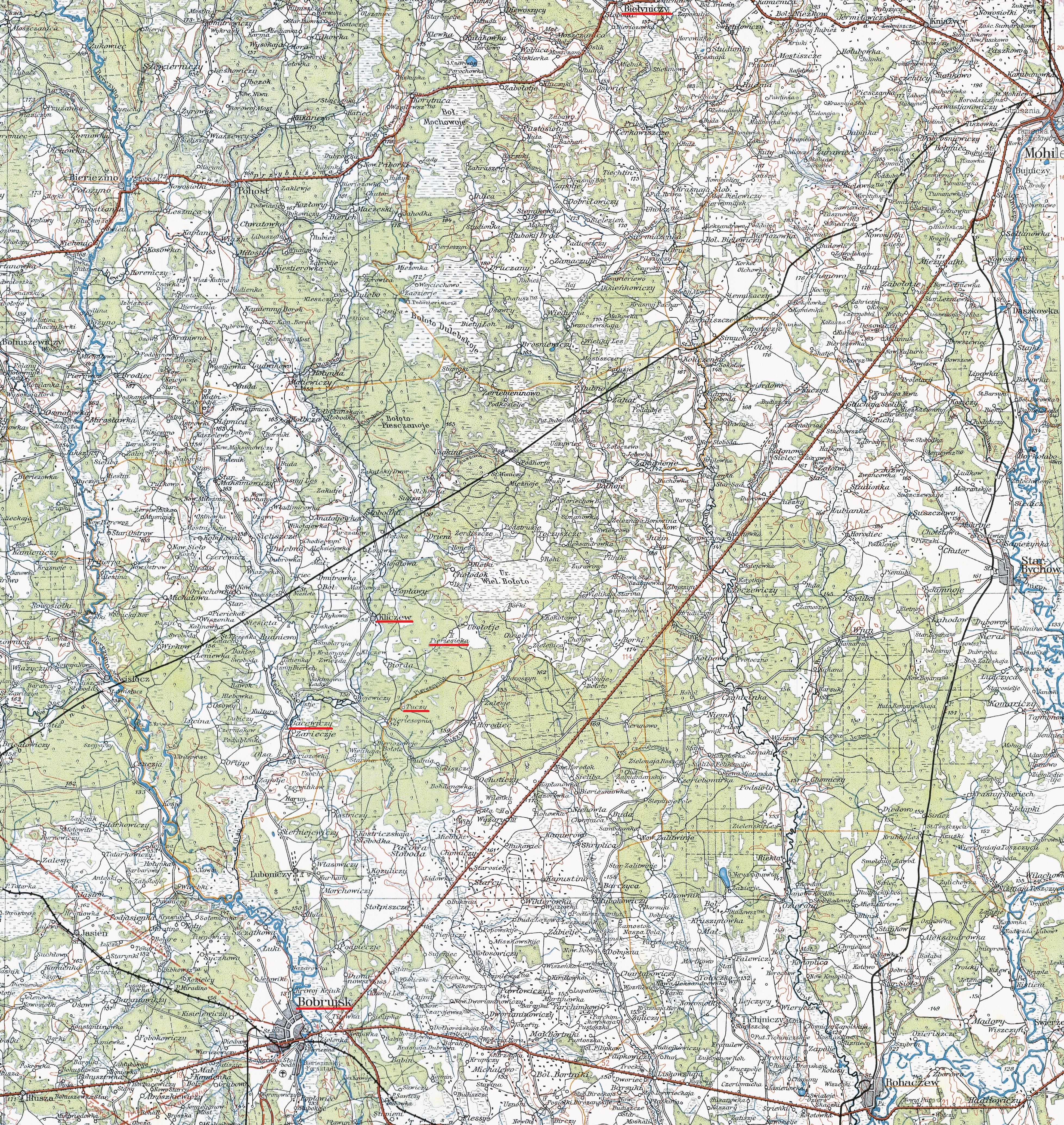 Okolice, w których toczy się akcja powieści "Nadberezyńcy" Floriana Czarnyszewicza. Na podstawie wojskowej mapy polskiej z 1934 roku.